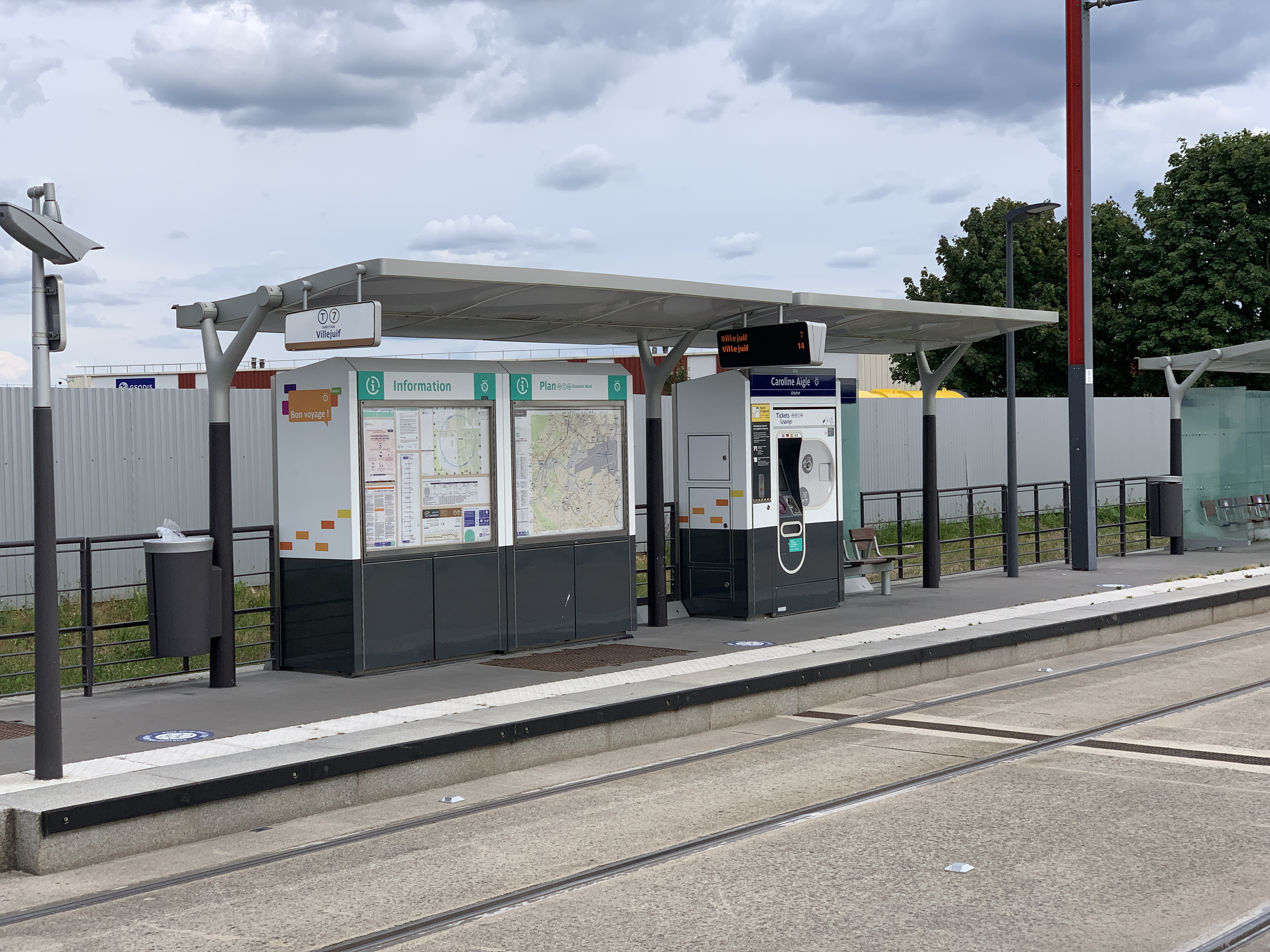 Station de tramway Caroline d'Aigle, ligne 7 du tramway d'Île-de-France, Orly.